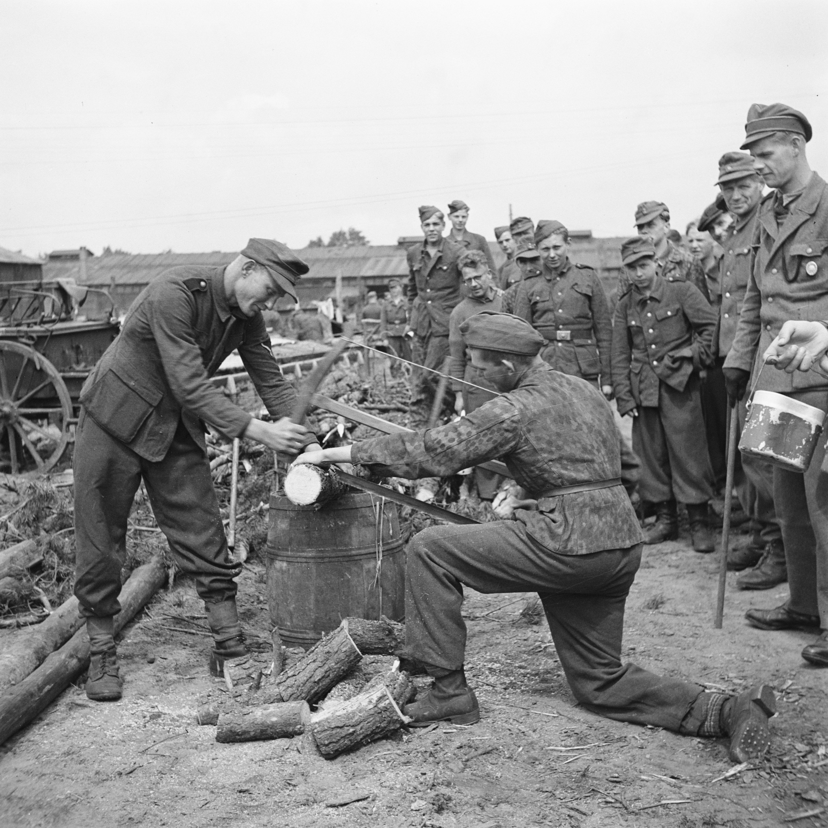 Collectie / Archief : Fotocollectie Anefo Reportage / Serie : Capitulatie: Harskamp [kamp waar SS-ers en Landwachters zijn geinterneerd] Beschrijving : Houtzagen Annotatie : In dit kamp werden ongeveer 4000 Nederlandse SS-gevangenen ondergebracht (waaronder Landmacht, Landstorm, Viking, Germania, Holl. Grüne Polizei etc.) hun berechting afwachtten Datum : juni 1945 Locatie : Gelderland, Harskamp Trefwoorden : interneringskampen, krijgsgevangenen, militairen, zagen Fotograaf : Poll, Willem van de / Anefo, [onbekend] Auteursrechthebbende : Nationaal Archief Materiaalsoort : Negatief (zwart/wit) Nummer archiefinventaris : bekijk toegang 2.24.01.03 Bestanddeelnummer : 900-3391